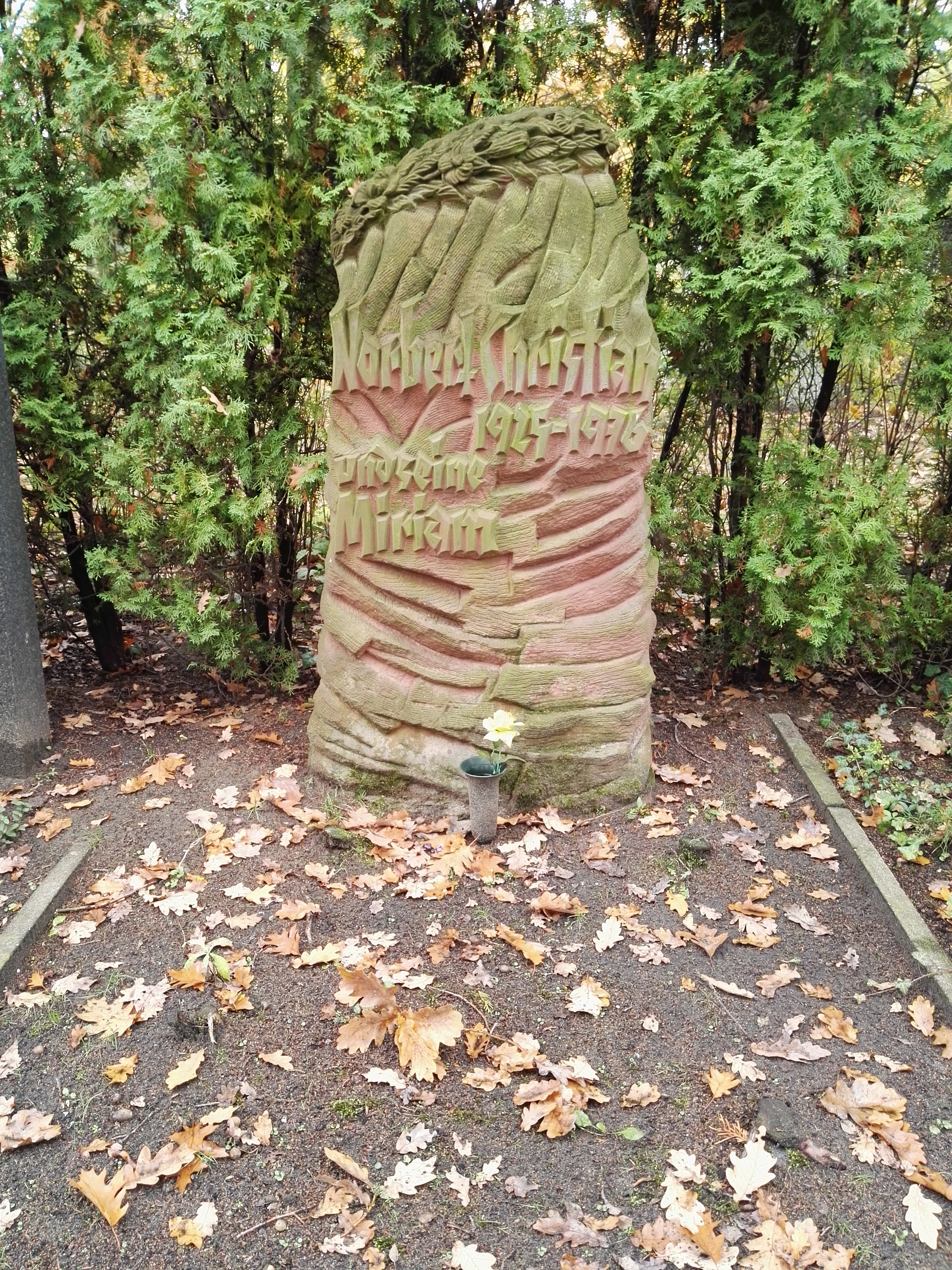 Grab von Norbert Christian auf dem Zentralfriedhof Friedrichsfelde